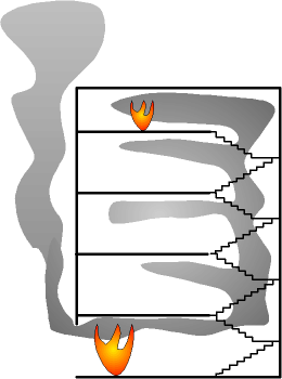 Propagation de l'incendie par les fumées dans un immeuble d'habitation. Fire extent due to the smoke in a habitation building. Auteur/author : Christophe Dang Ngoc Chan (cdang)